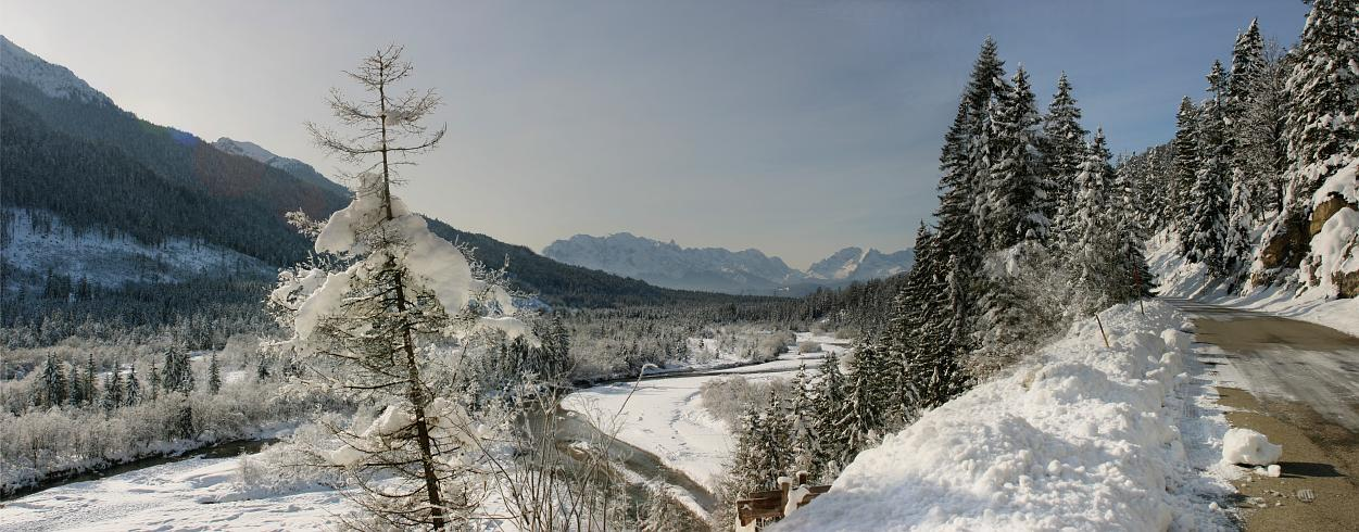 Blick über das Isartal zwischen Vorderriß und Wallgau